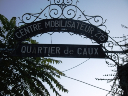 portail d'entée